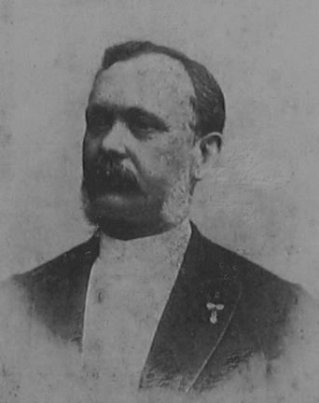 Ramón Oliva (1842 - 1906), autor de los jardines del parque de la Ciudadela (Barcelona), Campo Grande (Valladolid) y Campo del Moro (Madrid).